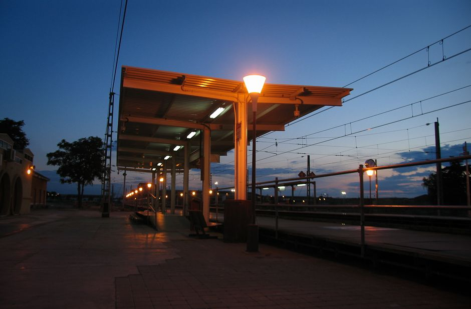 La estación de tren de Getafe Industrial pertenece a la línea de Cercanías C-3 (Madrid-Aranjuez) y sus usuarios principalmente son los trabajadores de la factoría de aviones Airbus o de otras empresas ubicadas en esta zona industrial de Getafe.